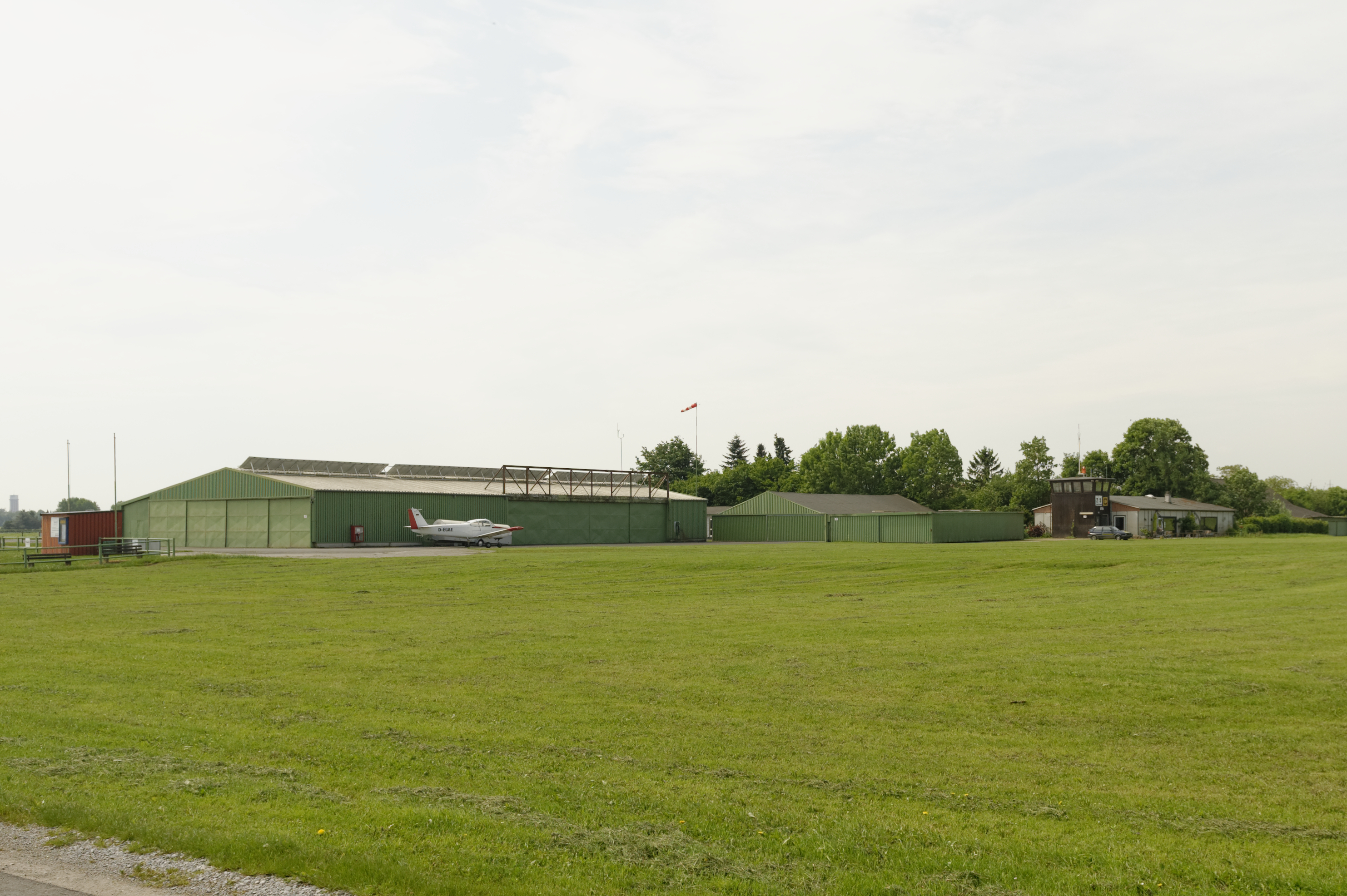 Flugplatz Kamp-Lintfort, Eindrücke